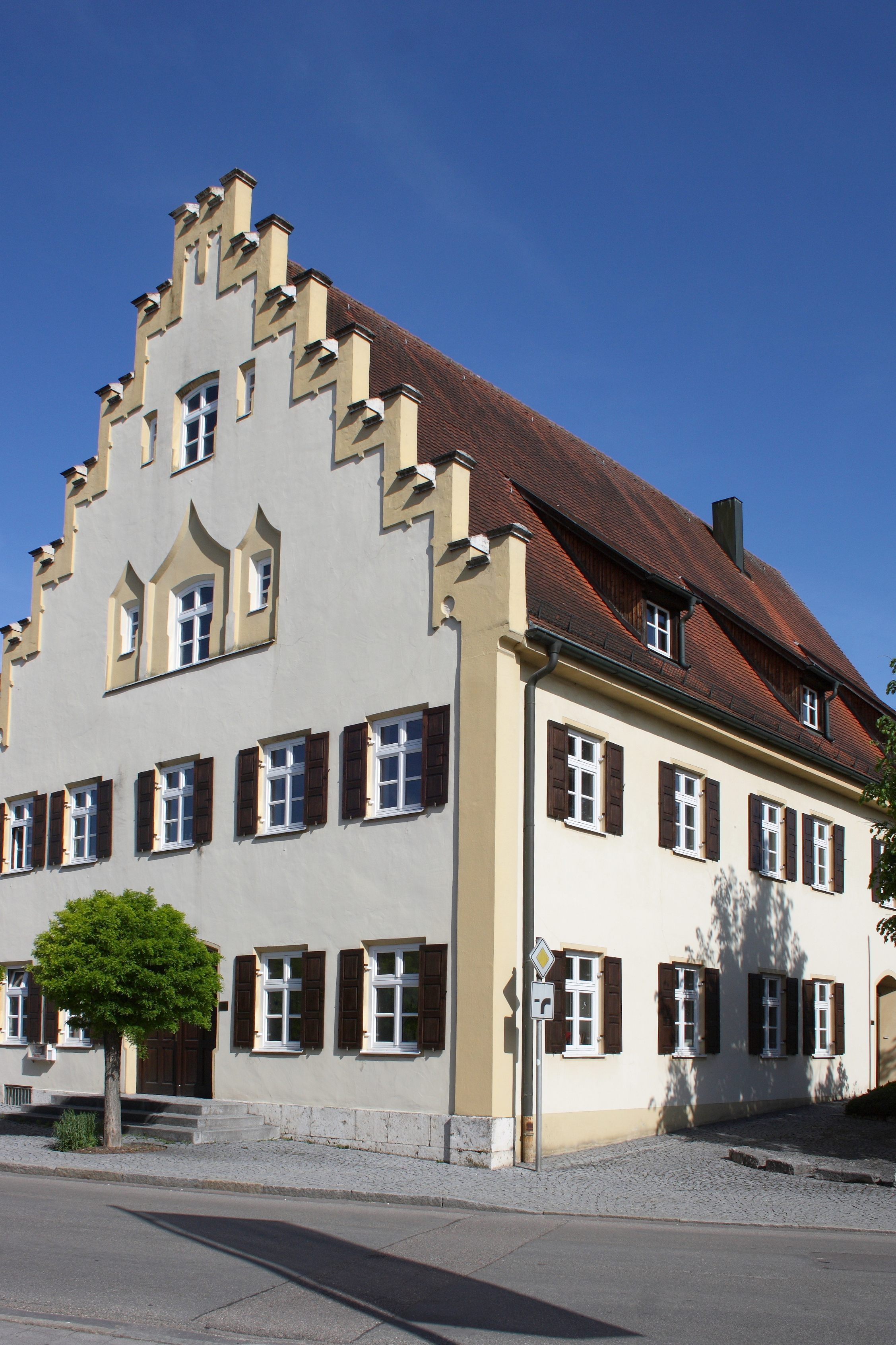 Rathaus in Wittislingen im Landkreis Dillingen an der Donau (Bayern)